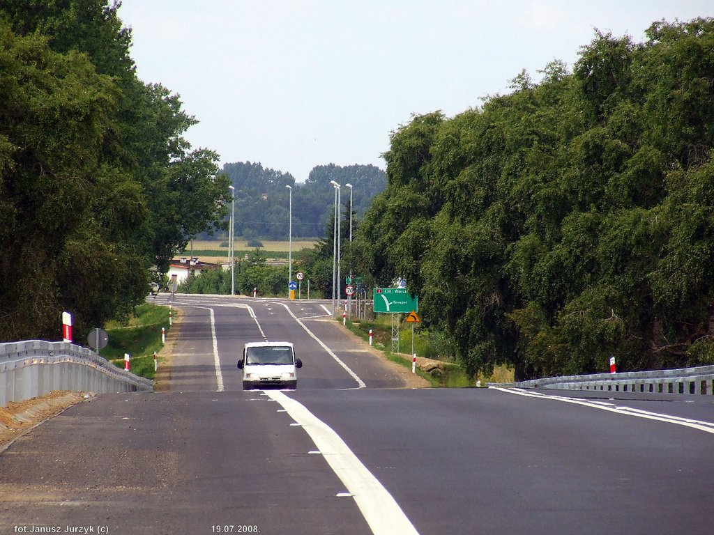 Droga krajowa nr 2 w okolicach Terespola.